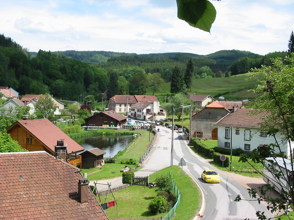 Grandrupt Le village, côté aval Commune du canton de Senones (Vosges) Photo personnelle du 4 juin 2006. Copyright © Christian Amet